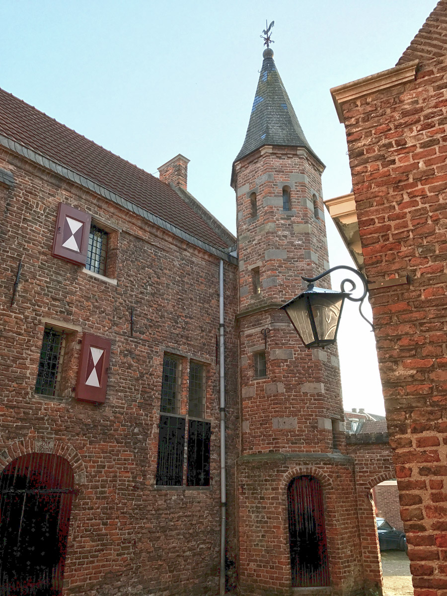 De Muntentoren, gelegen aan de Muntengang te Deventer. In dit monumentale gebouw was tot 1708 het laatste Deventer munthuis gevestigd.